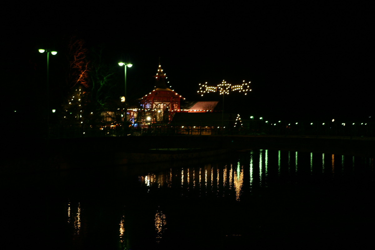 Payerbach, Park-Pavillon, Advent Markt